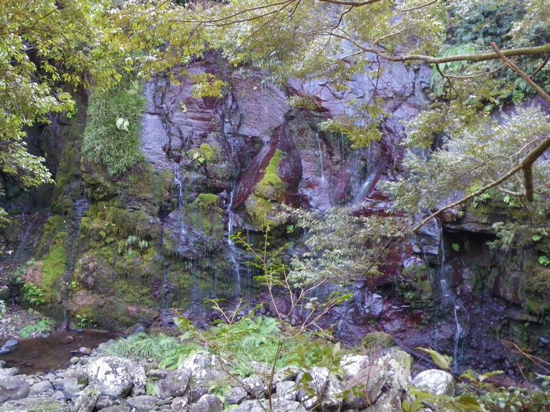 千綿渓谷・玉簾の滝。崖からの湧水が滝となって流れ落ちる。長崎県東彼杵町